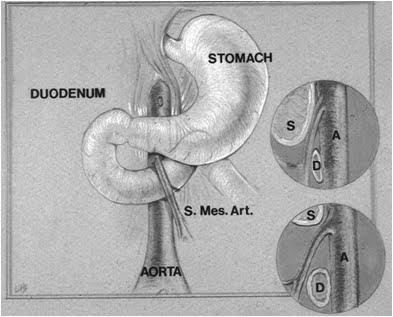 Síndrome de Wilkie